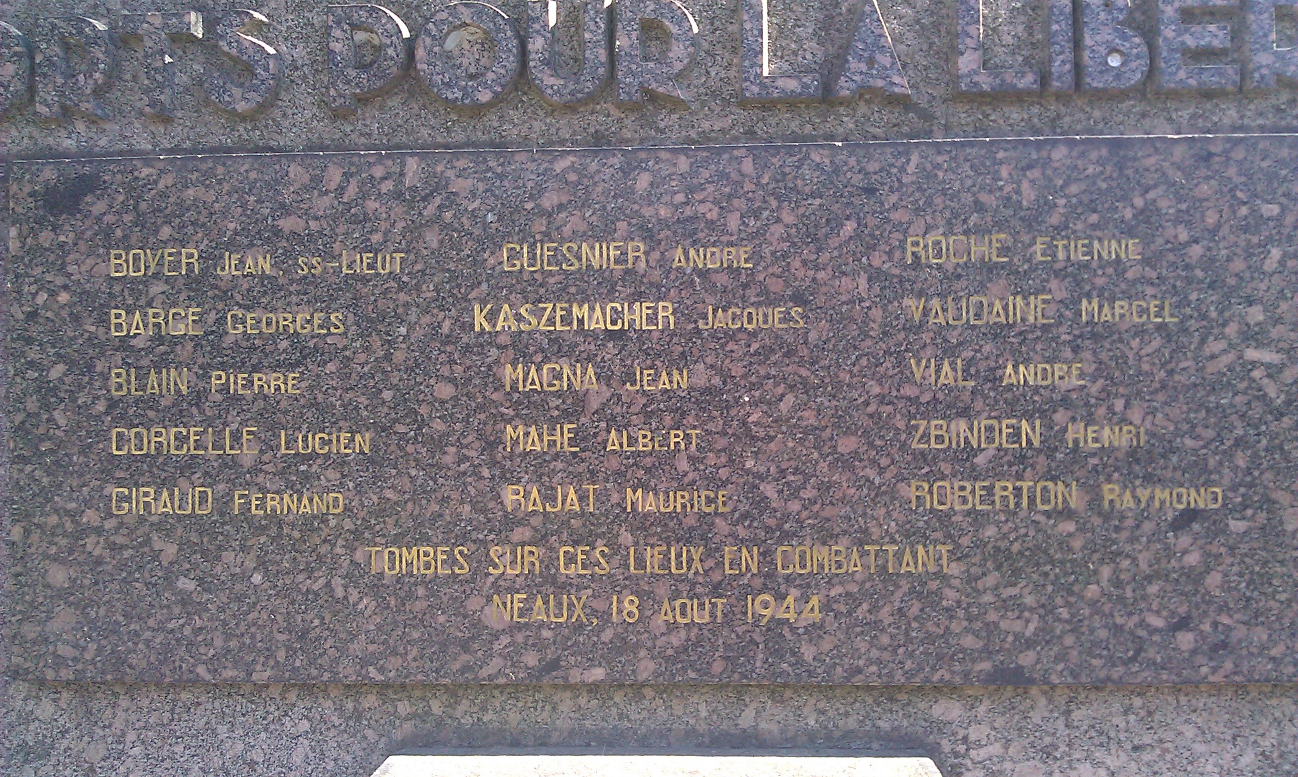 Monument en hommage au combat de Neaux (18 août 1944), le long de la Route Nationale 7, à l'entrée de la commune de Neaux, dans la Loire.